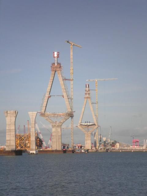 Los pilones del Puente de la Constitución de 1812 en construcción, marzo de 2013.